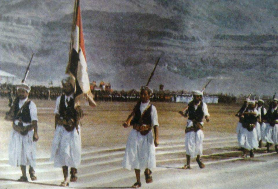 عرض لقوات جيش الثوره ثورة 26 سبتمبر 1926